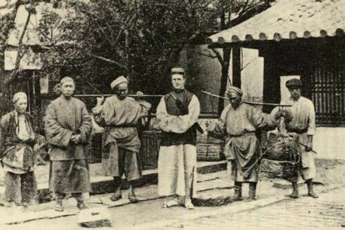 莫理循攝於中國西部 source A Project Gutenberg of Australia eBook